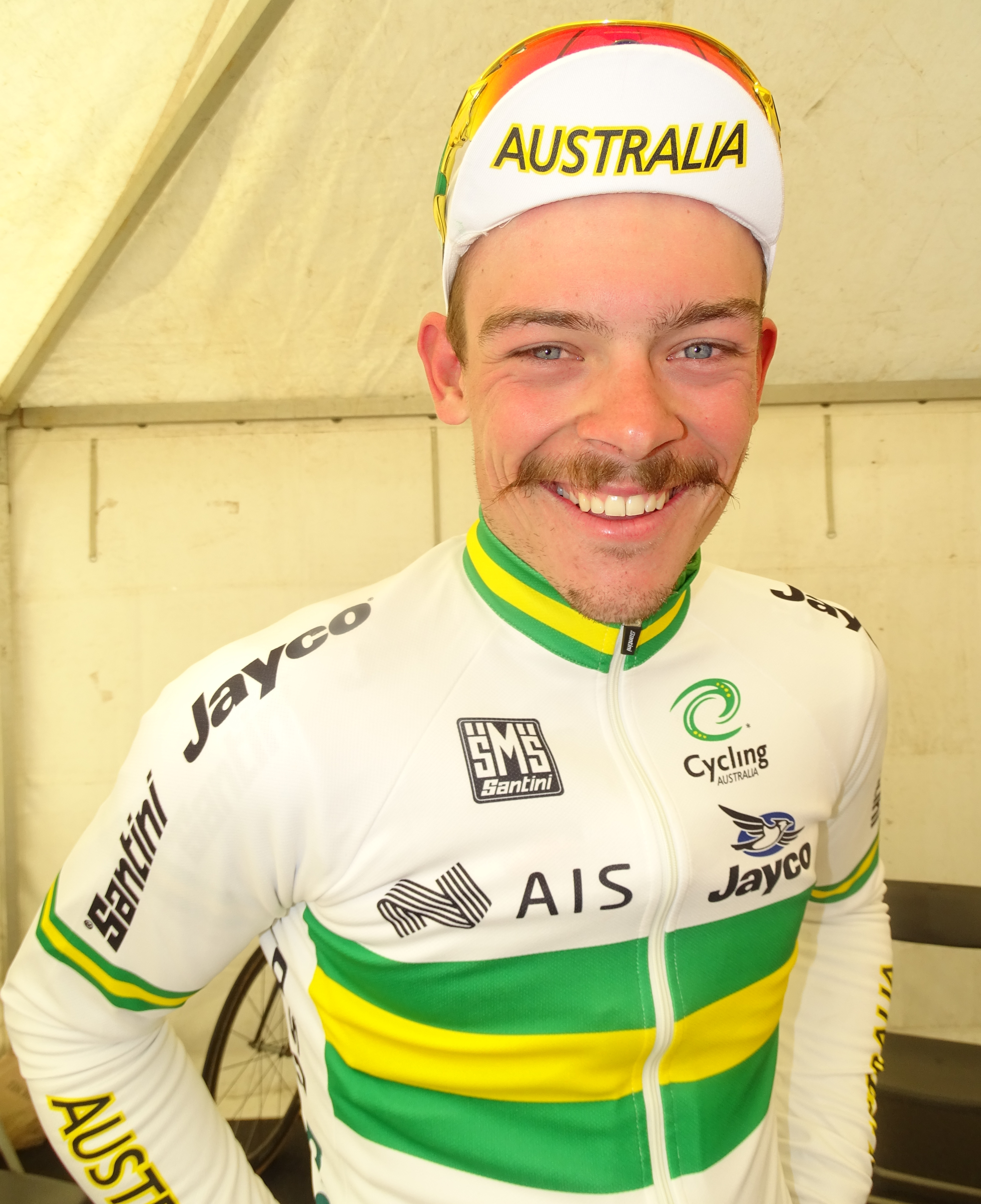 Reportage réalisé le samedi 11 avril à l'occasion du départ et de l'arrivée du Tour des Flandres espoirs 2015 à Audenarde, Belgique.